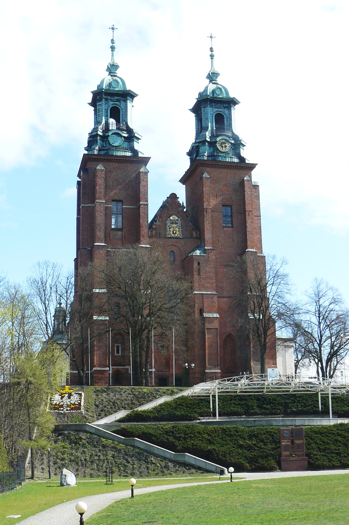 Katedra w Gnieźnie.